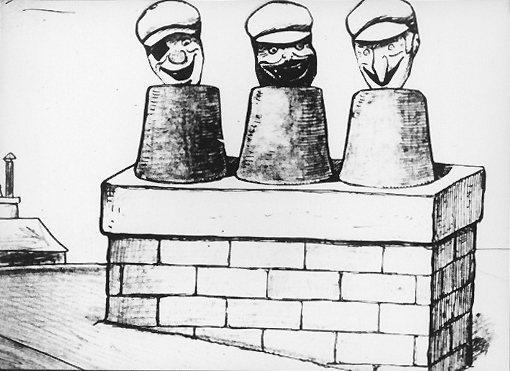 Les Aventures des Pieds Nickelés, an animation film by Émile Cohl.